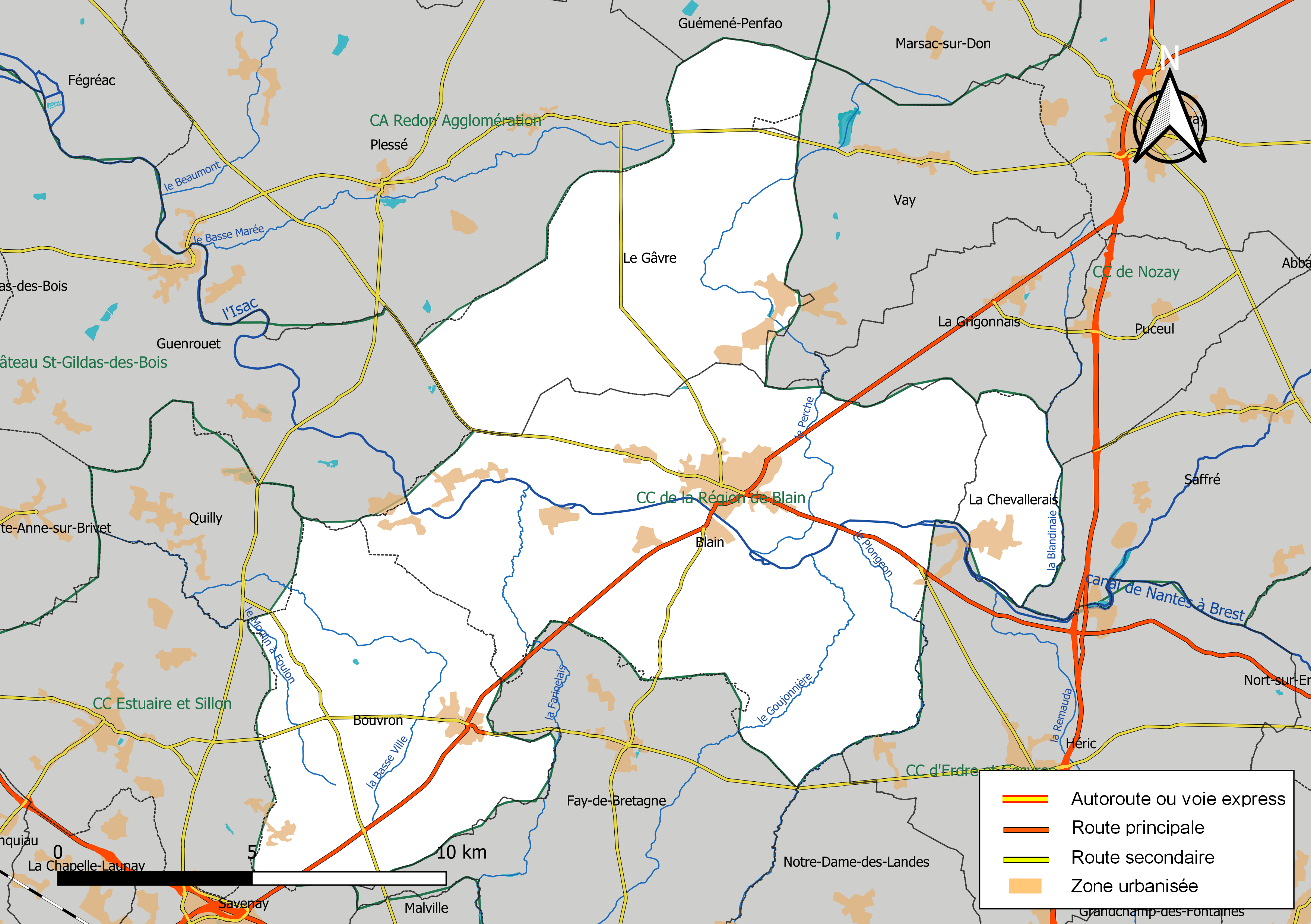 Carte géographique de la Communauté de communes de la Région de Blain, département de la Loire-Atlantique, France. Composition au 1er janvier 2019.